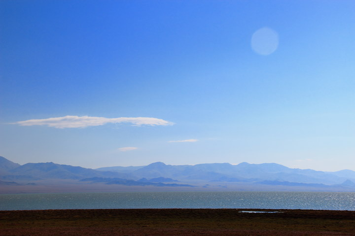 西藏自治区改则县洞错